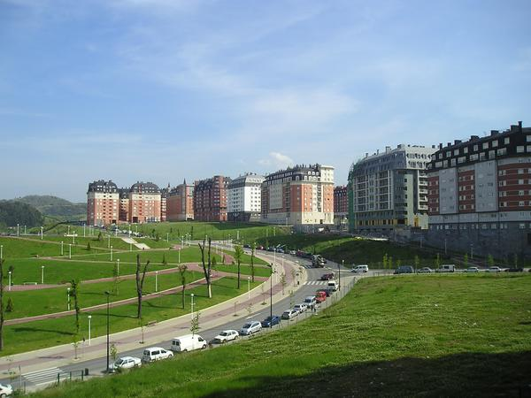 Miribillako auzo berria.